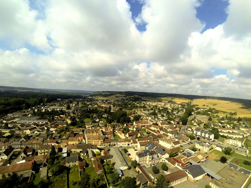 Vue aérienne de la ville de Gasny